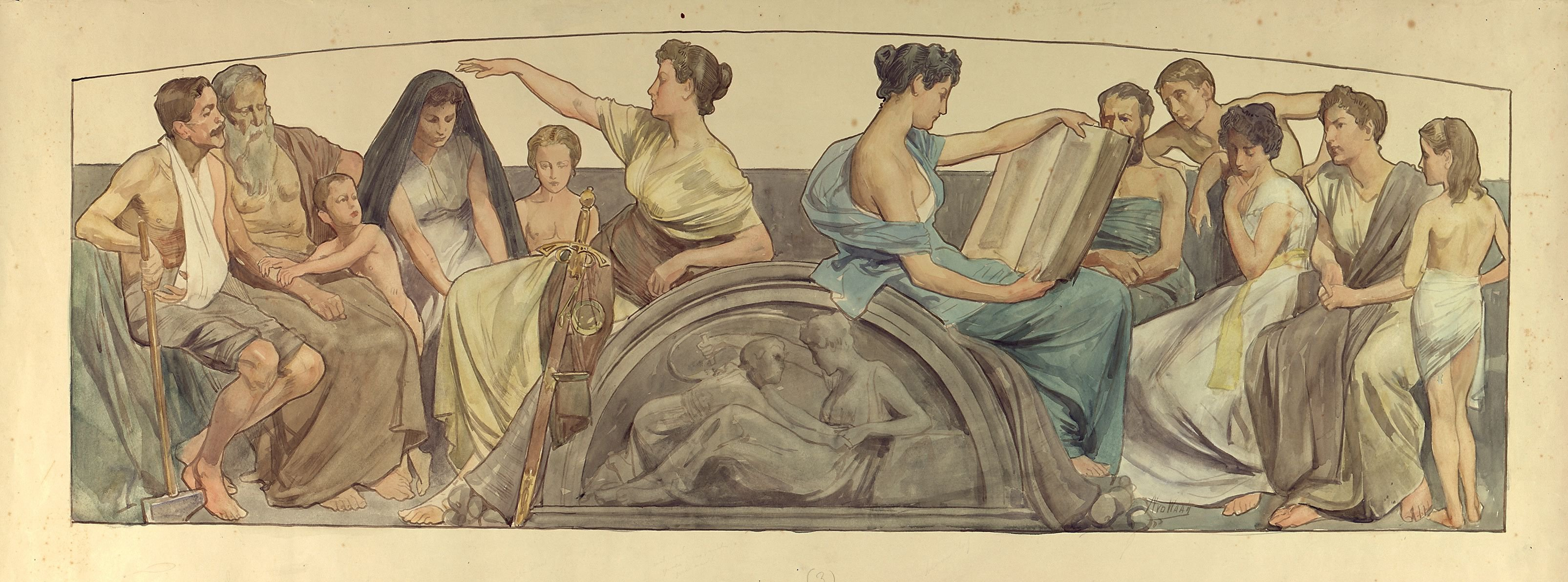 Ontwerptekening door Nicolaas van der Waay voor de beschildering van de voorkant van de Gouden Koets. Het ontwerp voor de voorkant dat de ideale Toekomst verbeeldt: onder andere onderwijs aan het volk (rechts) en bescherming voor hulpbehoevenden (links)